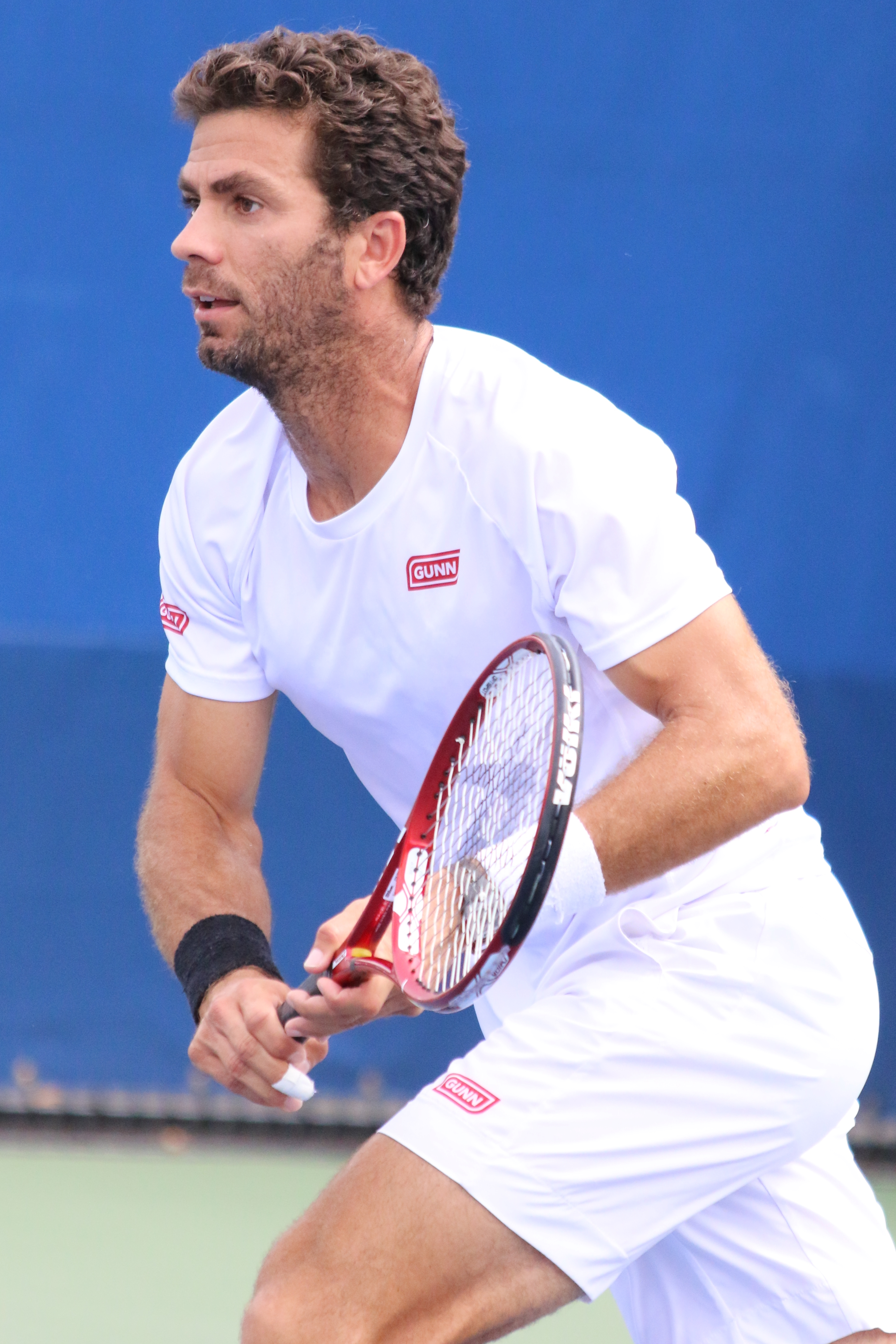 Rojer US16 (4)